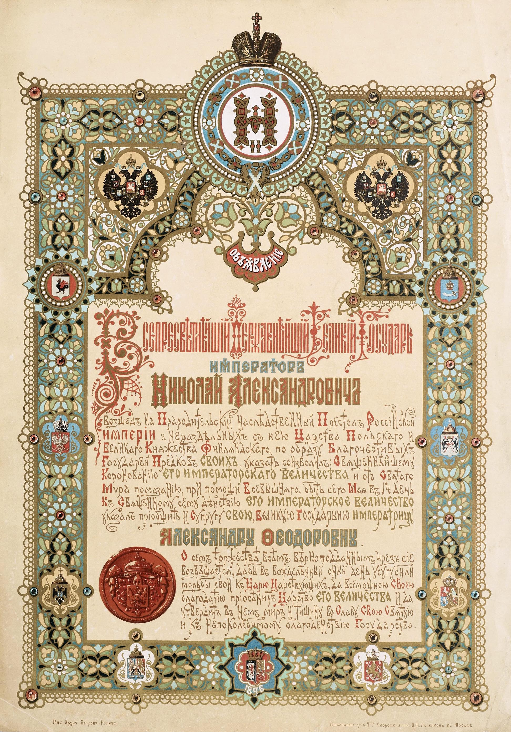 Объявление о Священном Короновании императора Николая Александровича (Николай II) и императрицы Александры Фёдоровны (Александра Фёдоровна (жена Николая II)) Источник ГА РФ Ф.601.Оп.1. Д.119. Л.46; Время создания Май 1896 г.